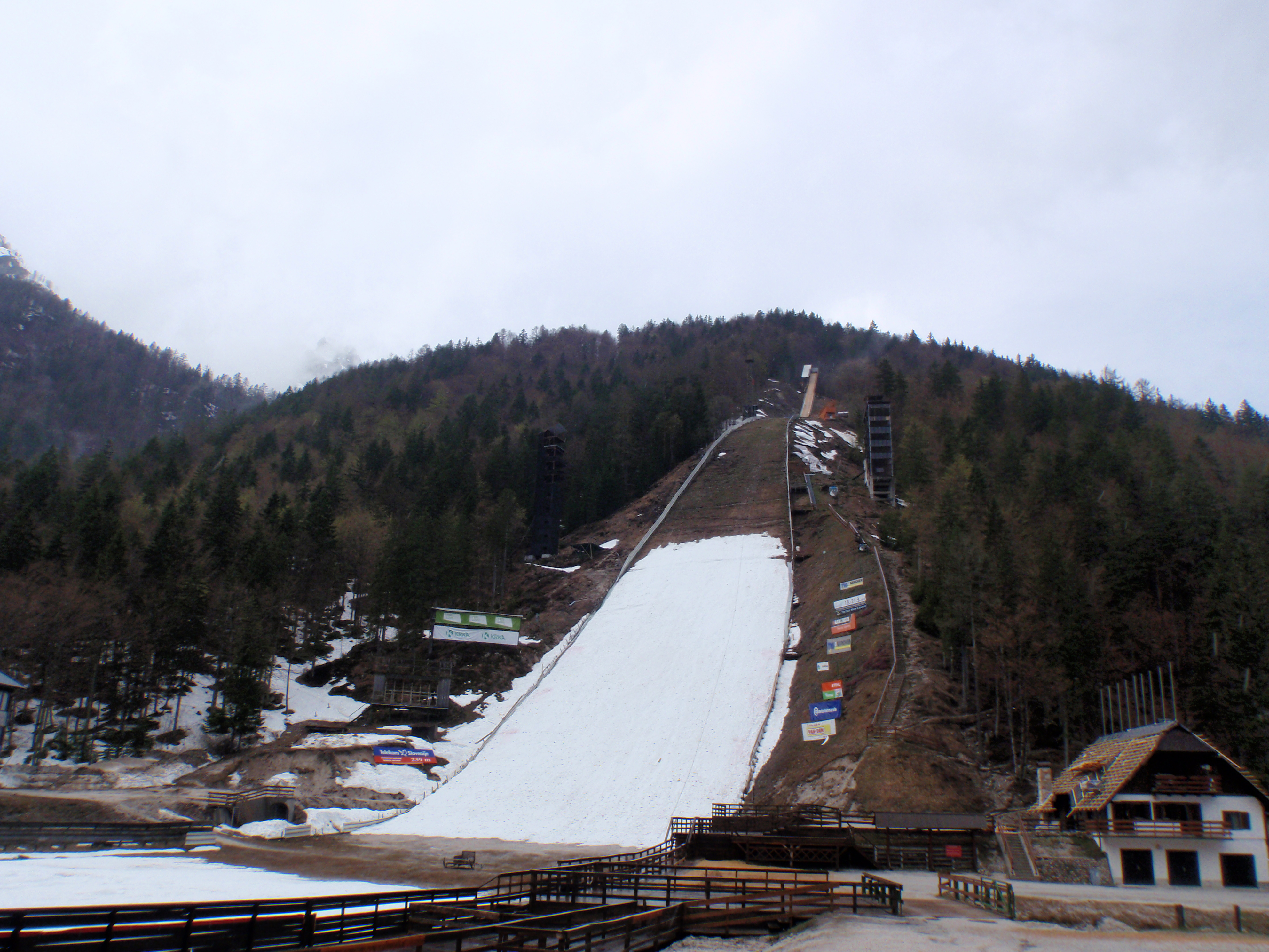 Letalnica ski flying hill in Planica, Slovenia